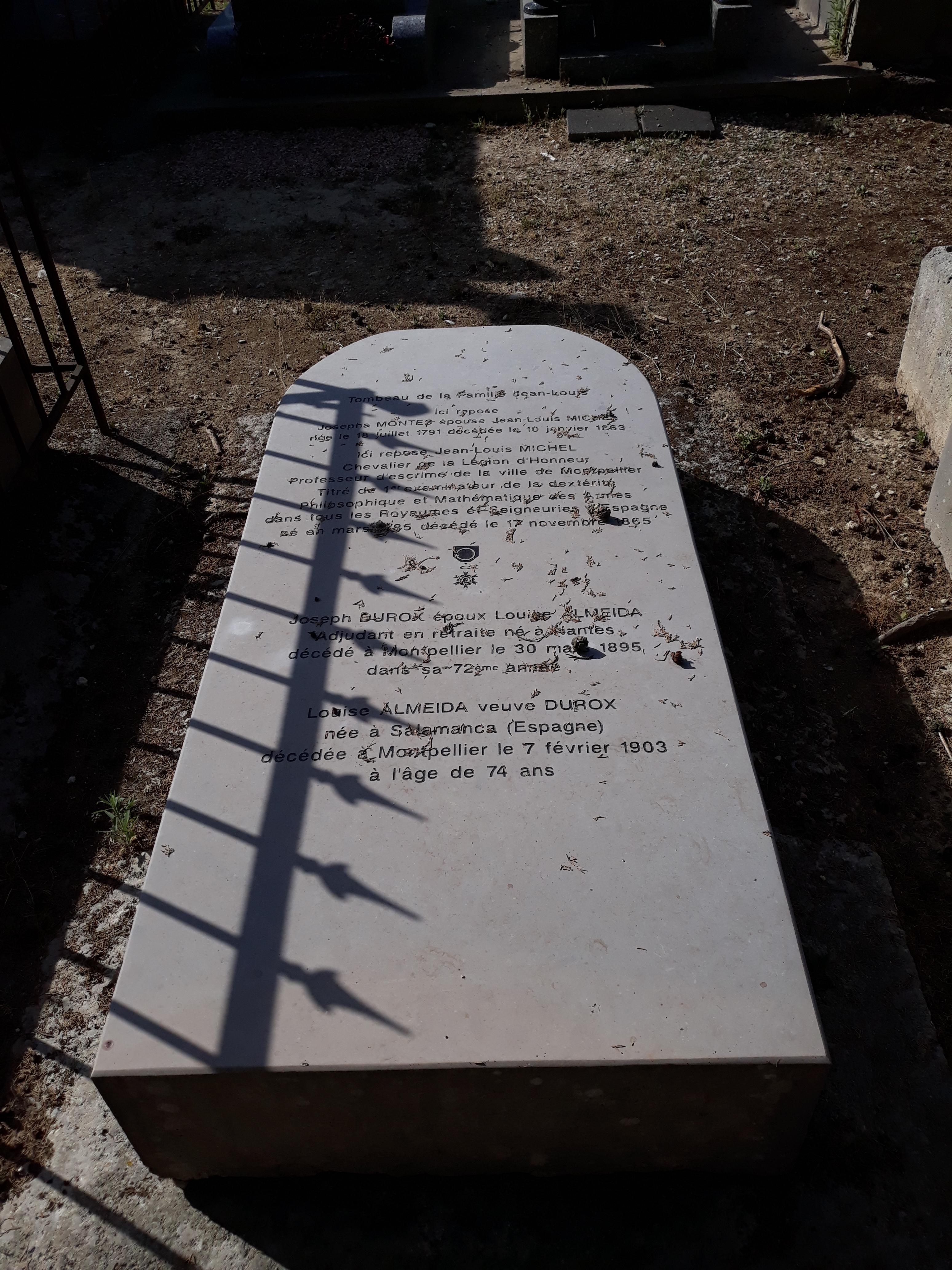 Das Grab des französischen Fechtsportlers Jean-Louis Michel auf dem Cimetière Saint-Lazare in Montpellier.